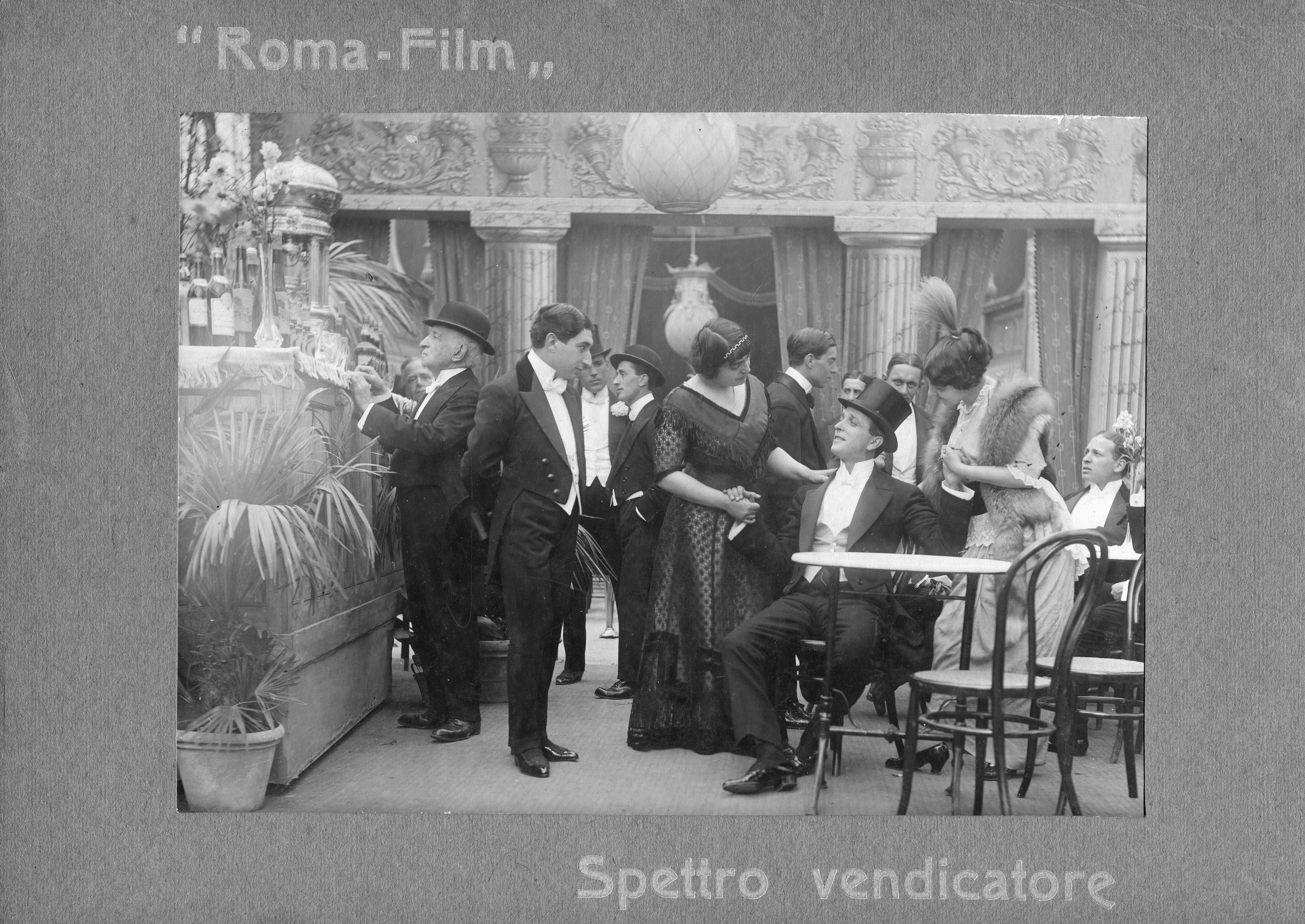 Scena tratta dal film di Romolo Bacchini "Spettro Vendicatore" (1914)